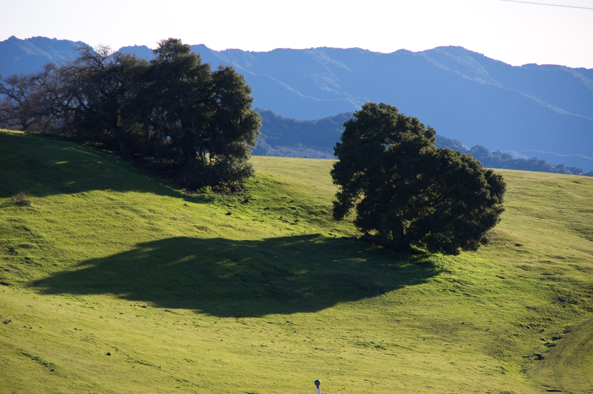 Santa Ynez, CA